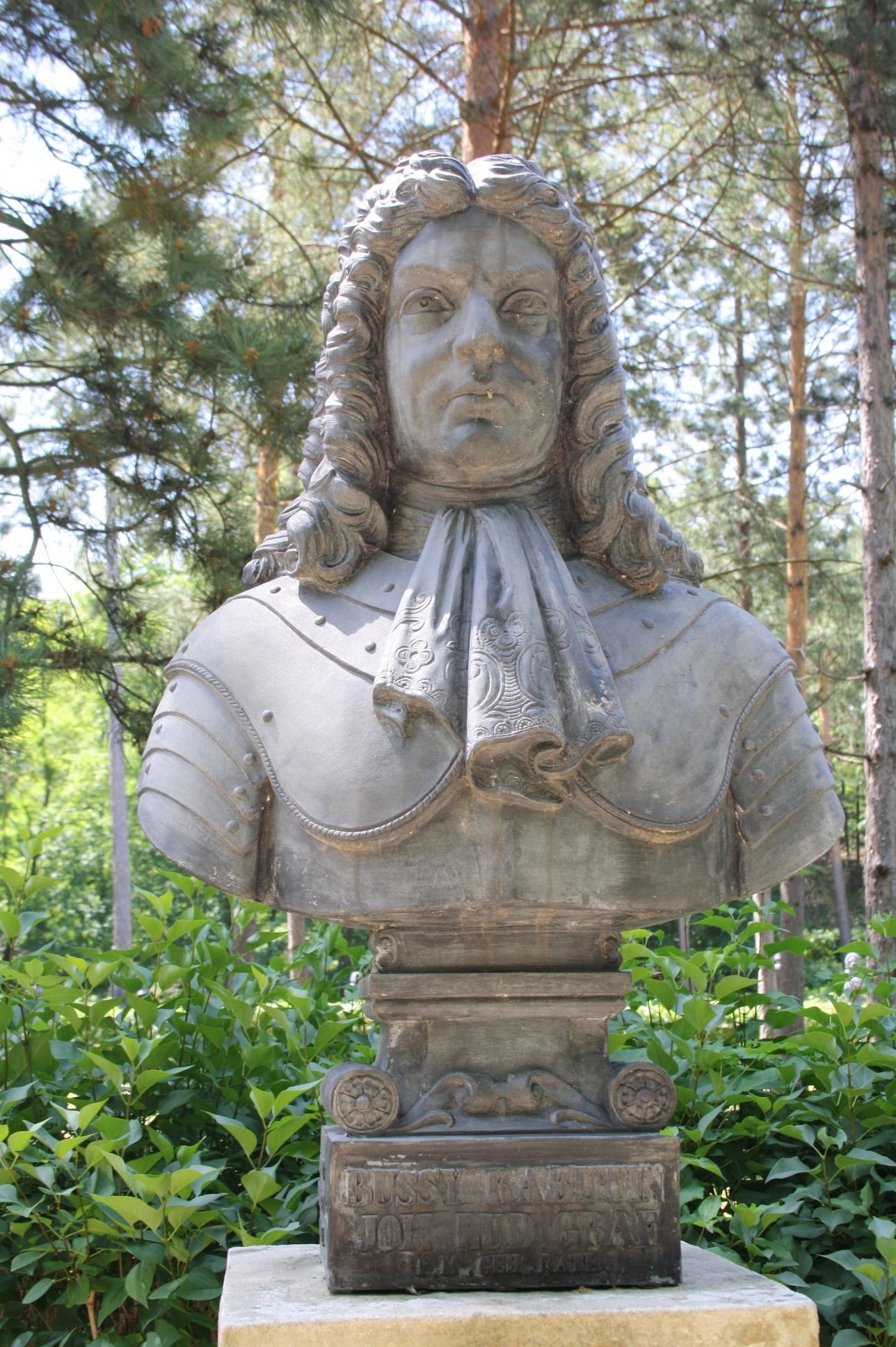 Büste in der Gedenkstätte Heldenberg (Niederösterreich)